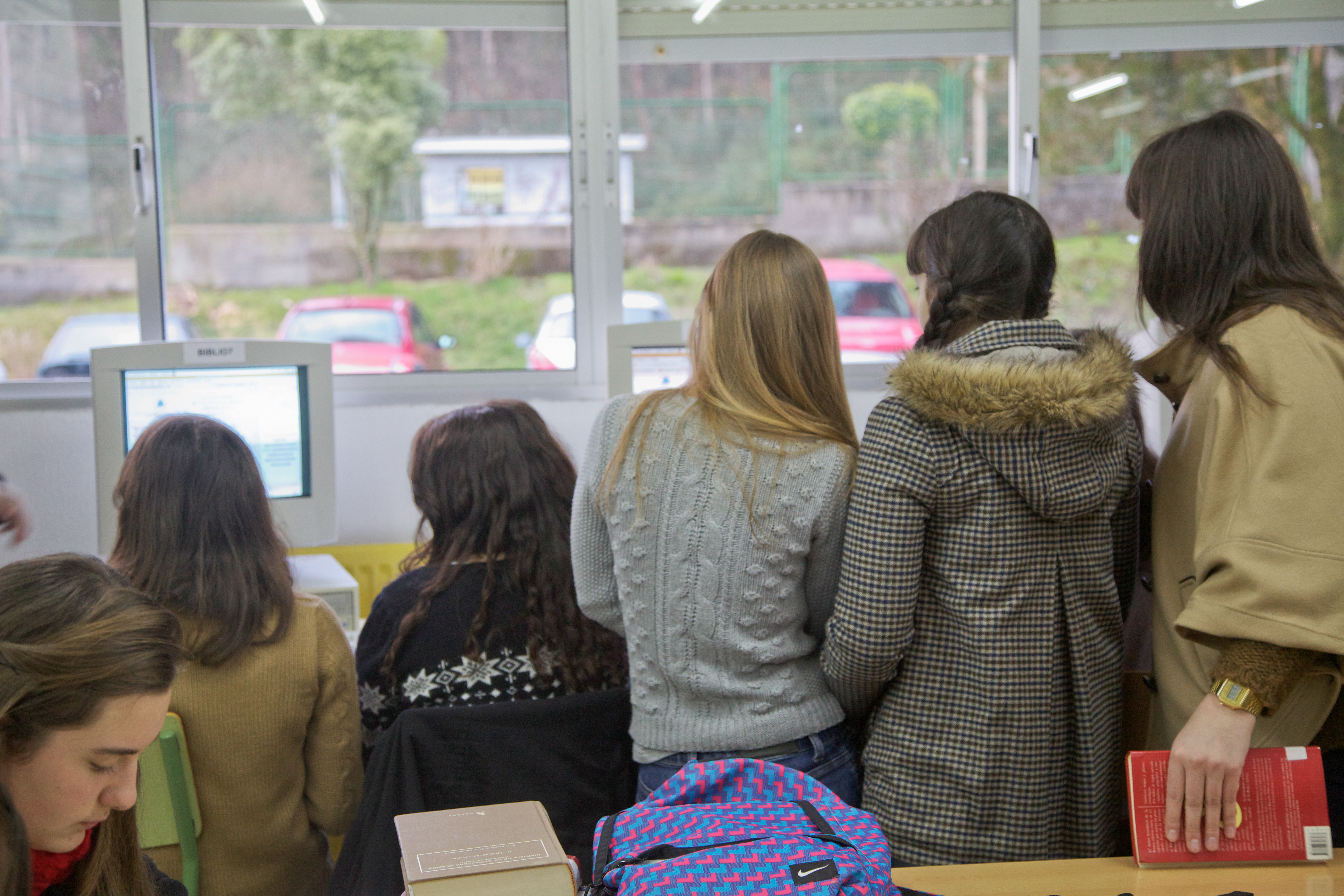 Concurso de Cultura Clásica Odisea. Foto tirada na Biblioteca do IES "Manuel García Barros", A Estrada, Galiza